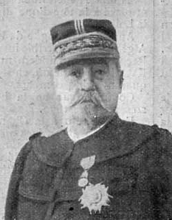 French general Félix Gustave Saussier (1828-1905)